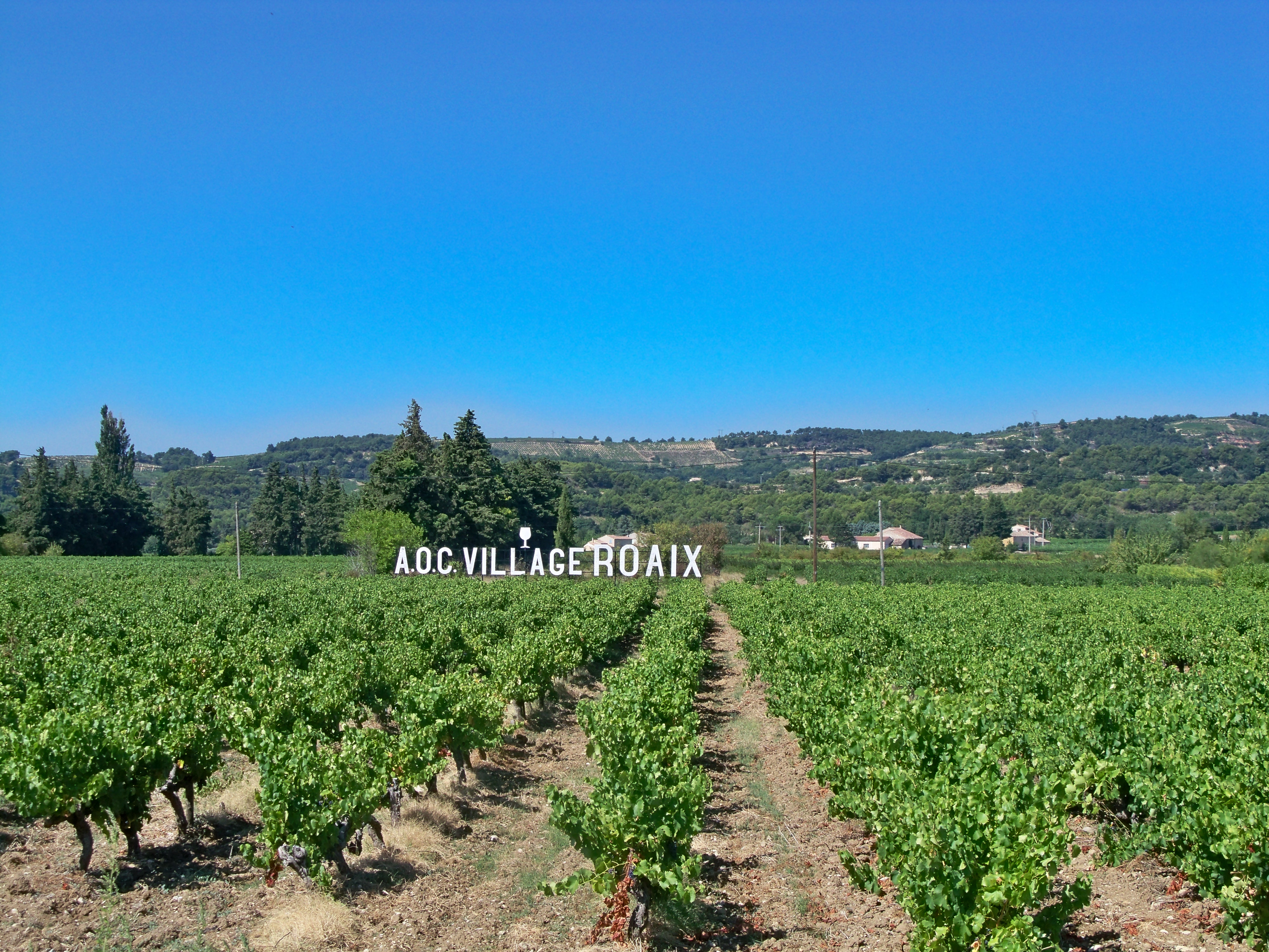 Vignes à Roaix, Vaucluse, France